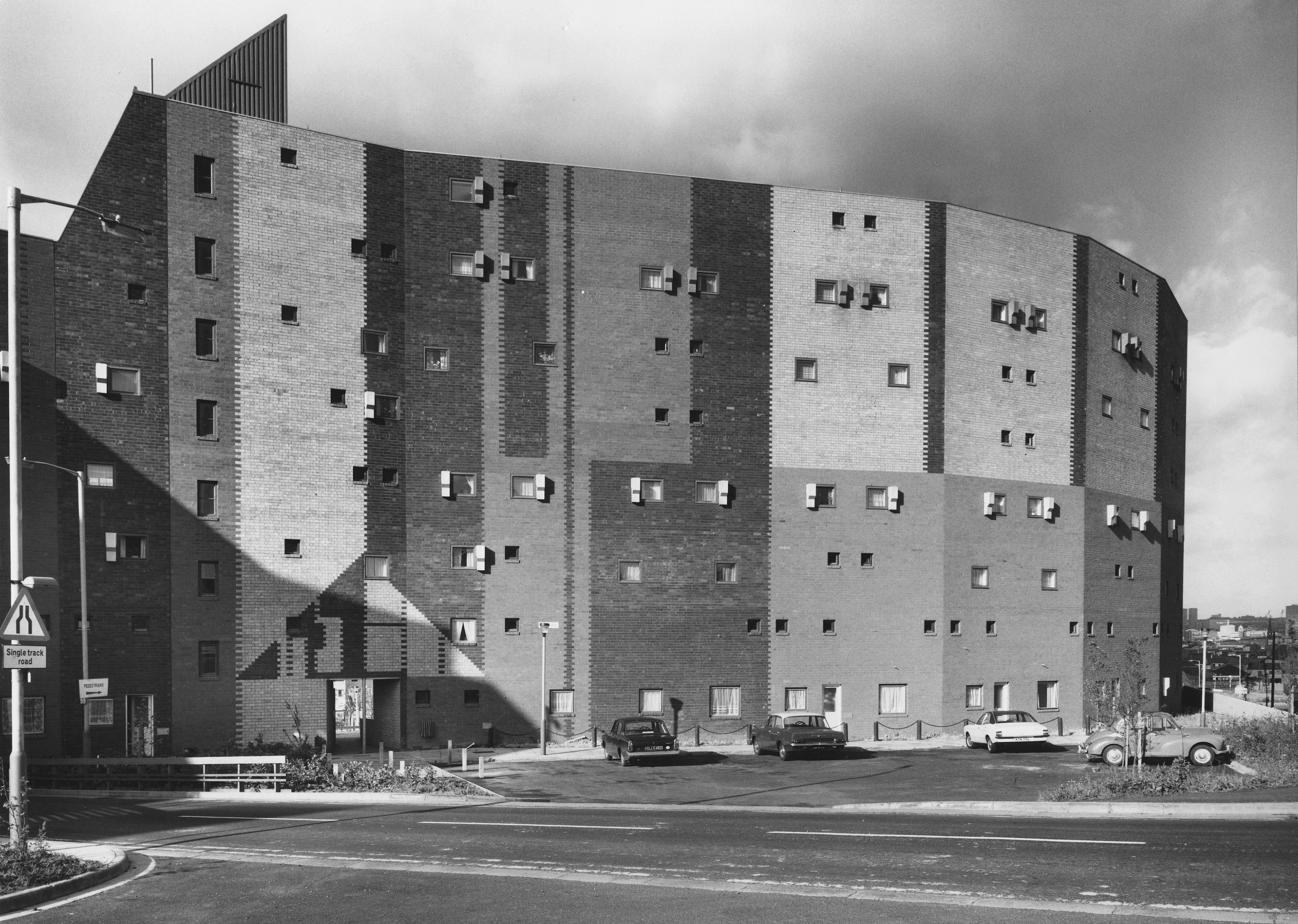 Del av Byker Wall stadsdelen Byker i Storbritannien (GB), Newcastle